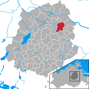 Kruckow, Landkreis Demmin, Mecklenburg-Vorpommern